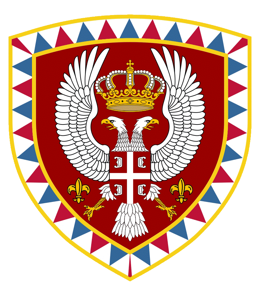 Serbian guard (Garda)